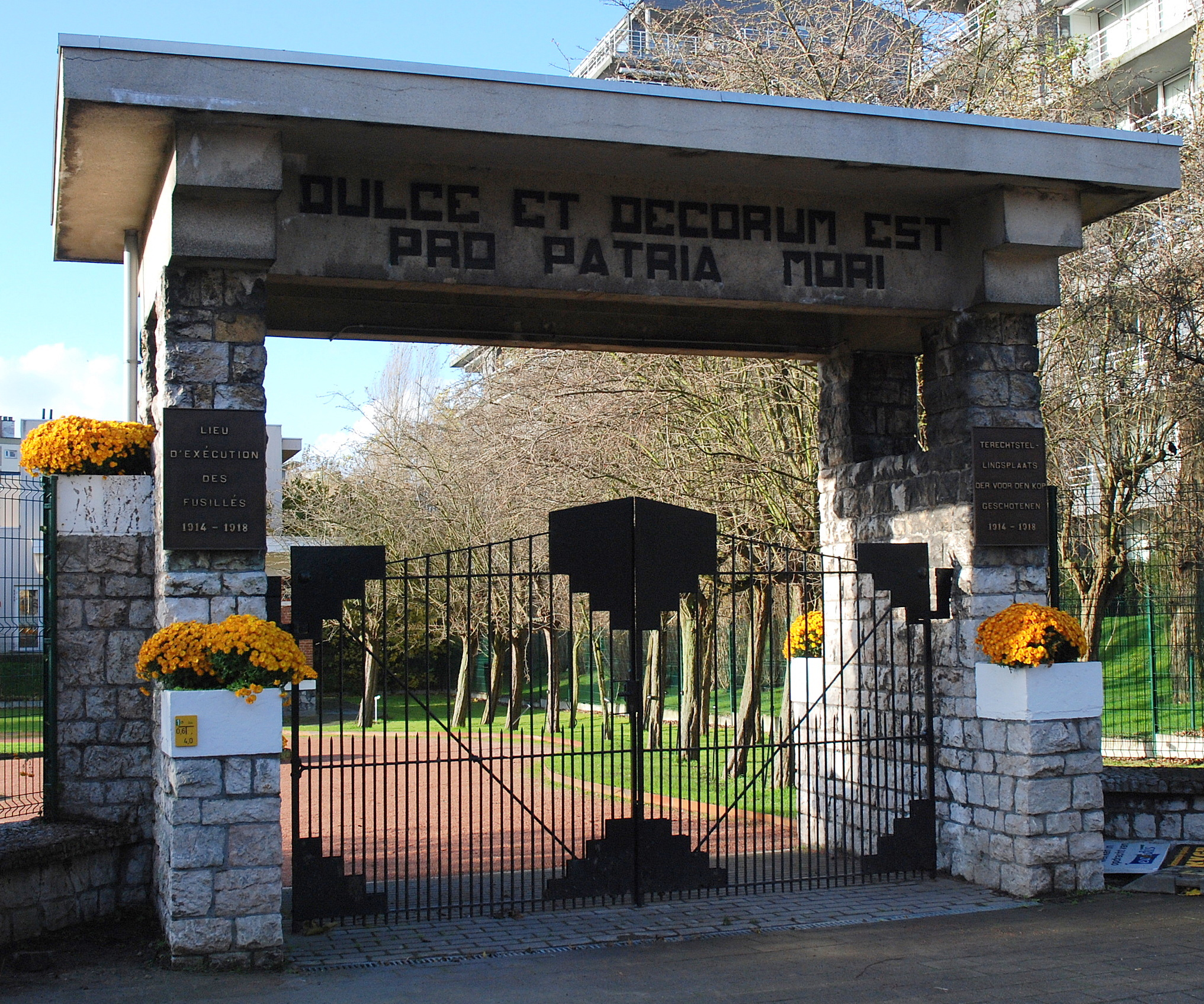 Ingang van een terrein aan de Offerlaan te Gent waar tijdens de eerste wereldoorlog 52 burgers werden doodgeschoten